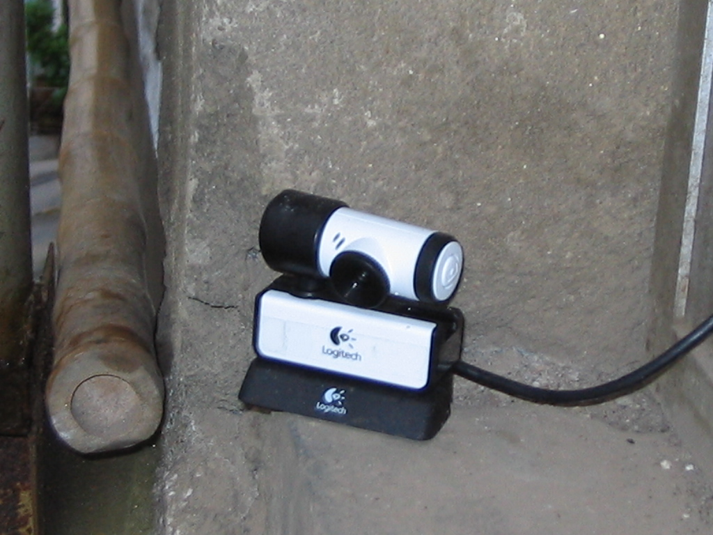 放在户外的摄像头 此照片是我（User:陈少举）拍摄的。我允许此照片进入公共领域。